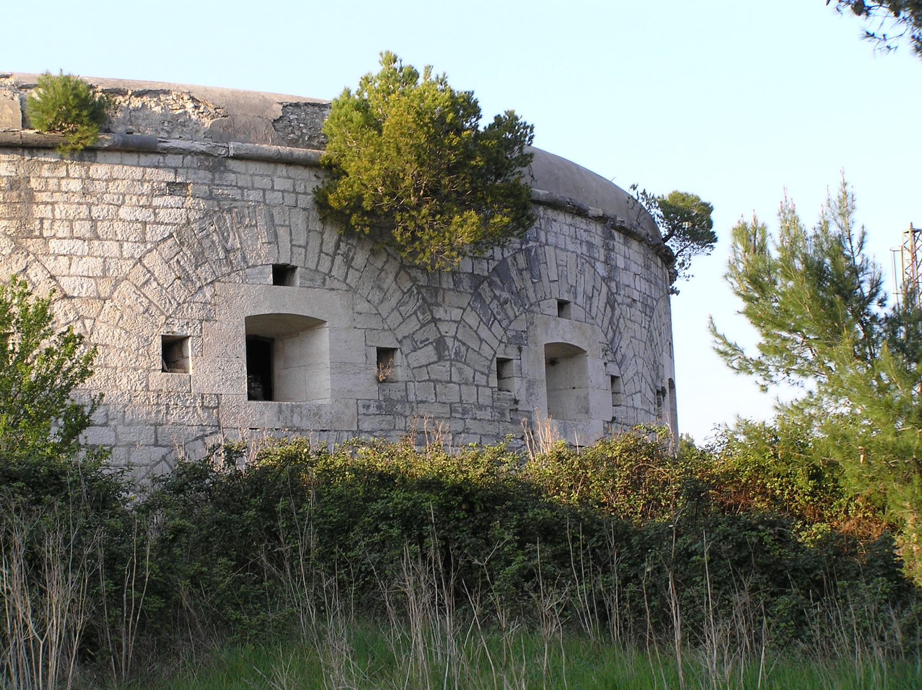 Fort Monte Serpente in Pula, Croatia self-made